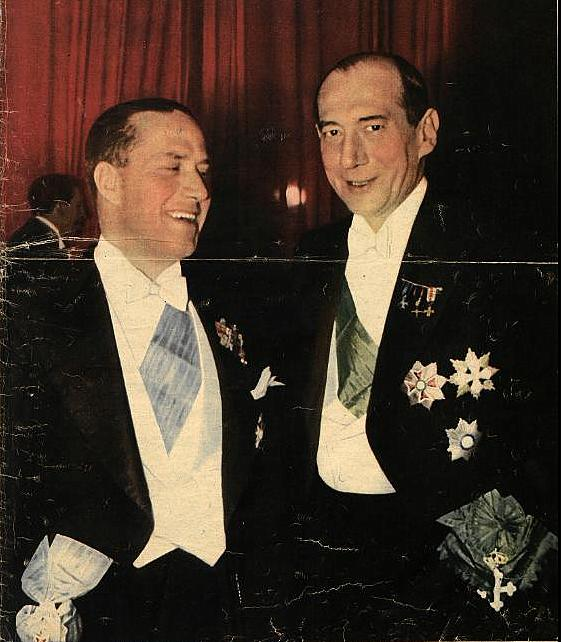 Galeazzo Ciano (przepasany wstęgą Orderu Orła Białego) i Józef Beck (przepasany Wielką Wstęgą Orderu Świętych Maurycego i Łazarza) podczas rautu w Pałacu Brühla w Warszawie (1939).